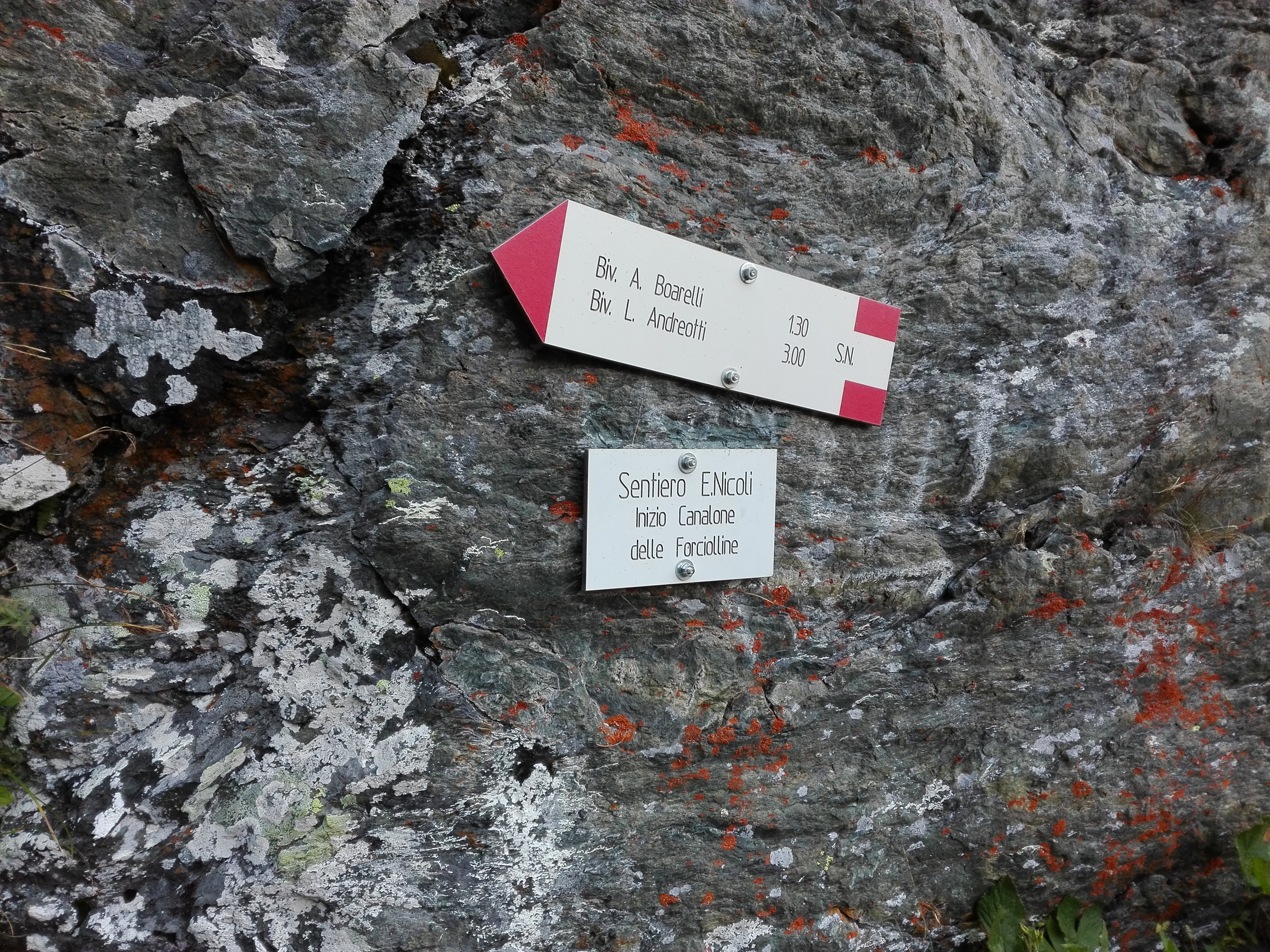 Targa su sentiero Ezio Nicoli posta all'inizio del canalone delle Forciolline